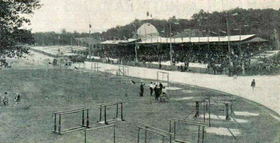 Le nouveau vélodrome municipal de Vincennes, lieu du concours de gymnastique des JO 1900.